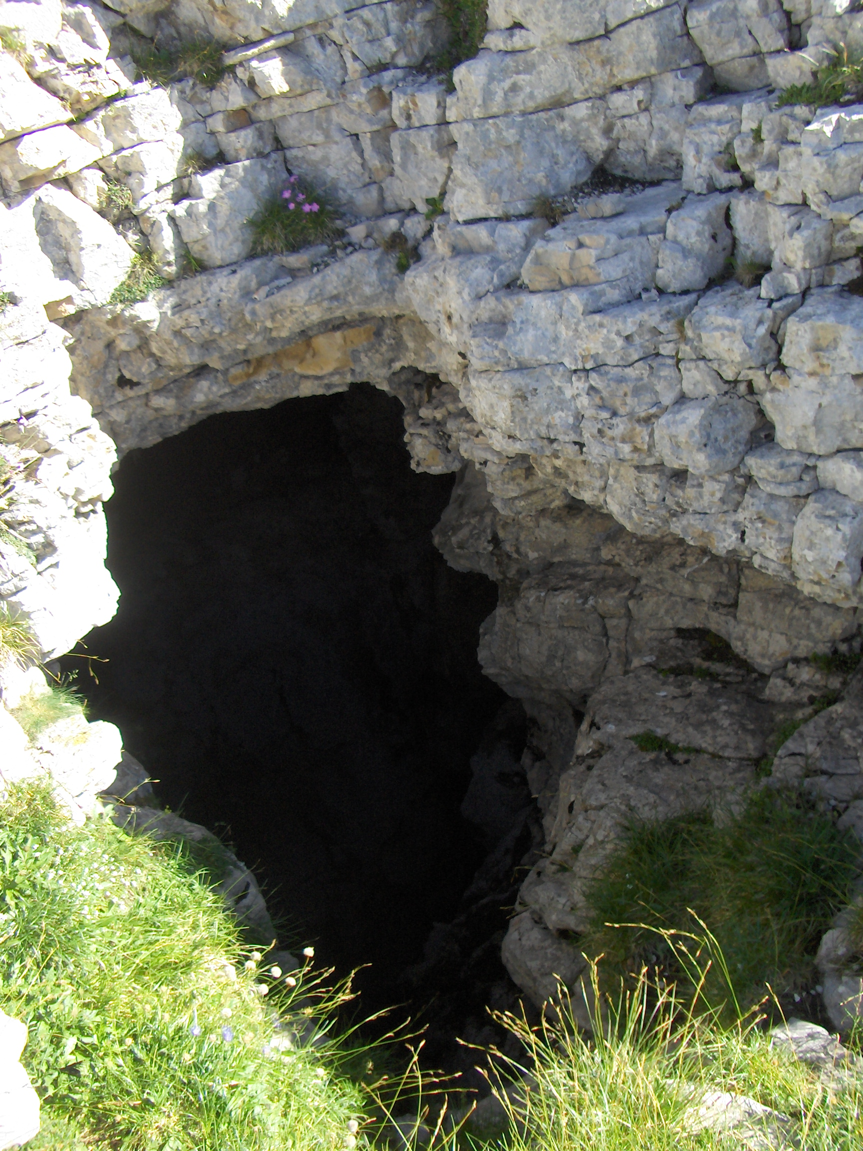 Scialet de la Nymphe émue ,entrée la plus haute du réseau.